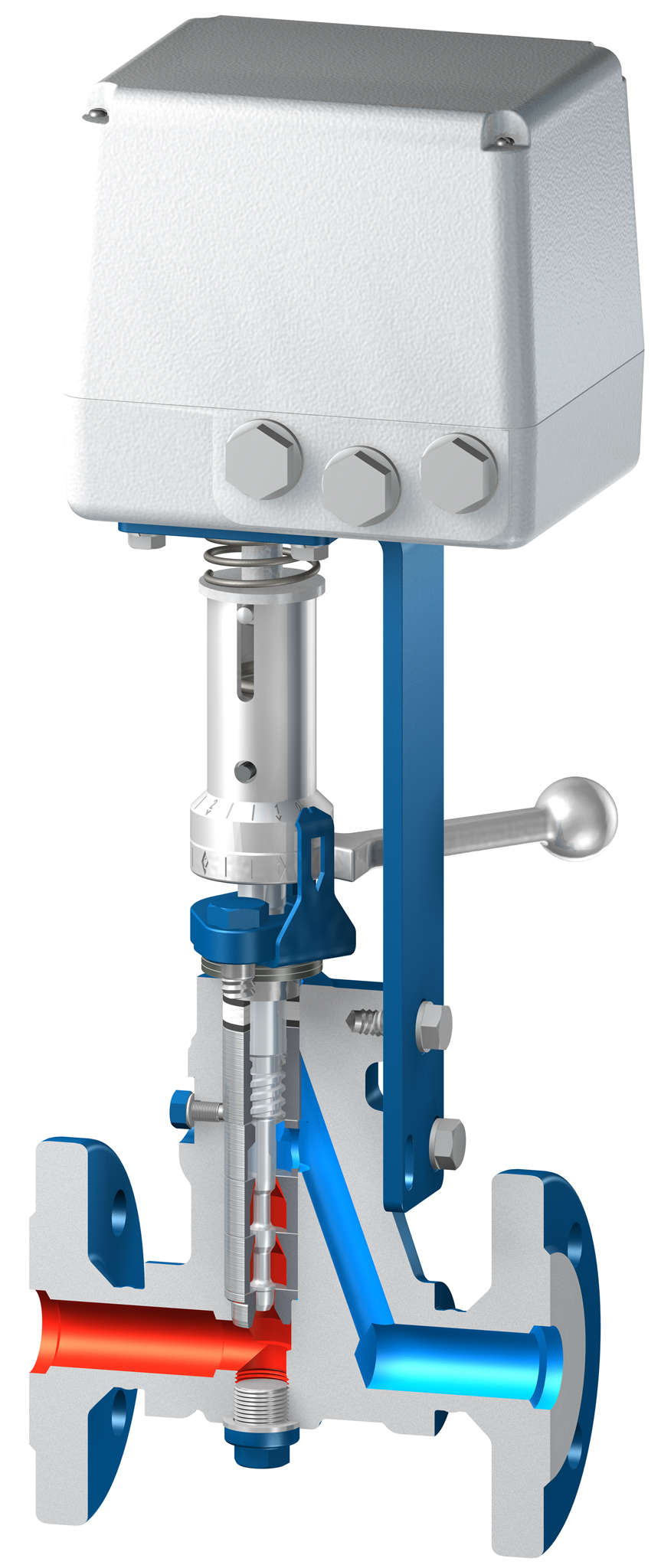 Automatisches Absalzventil im Schnitt.